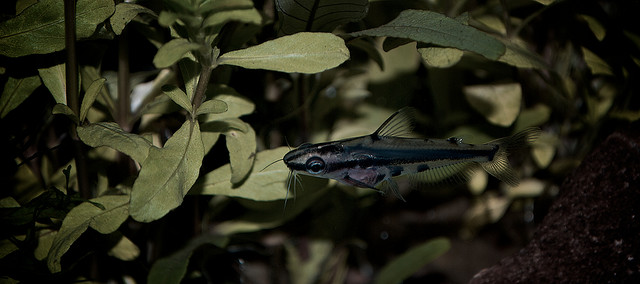 Pelteobagrus ornatus (=Hyalobagrus ornatus)